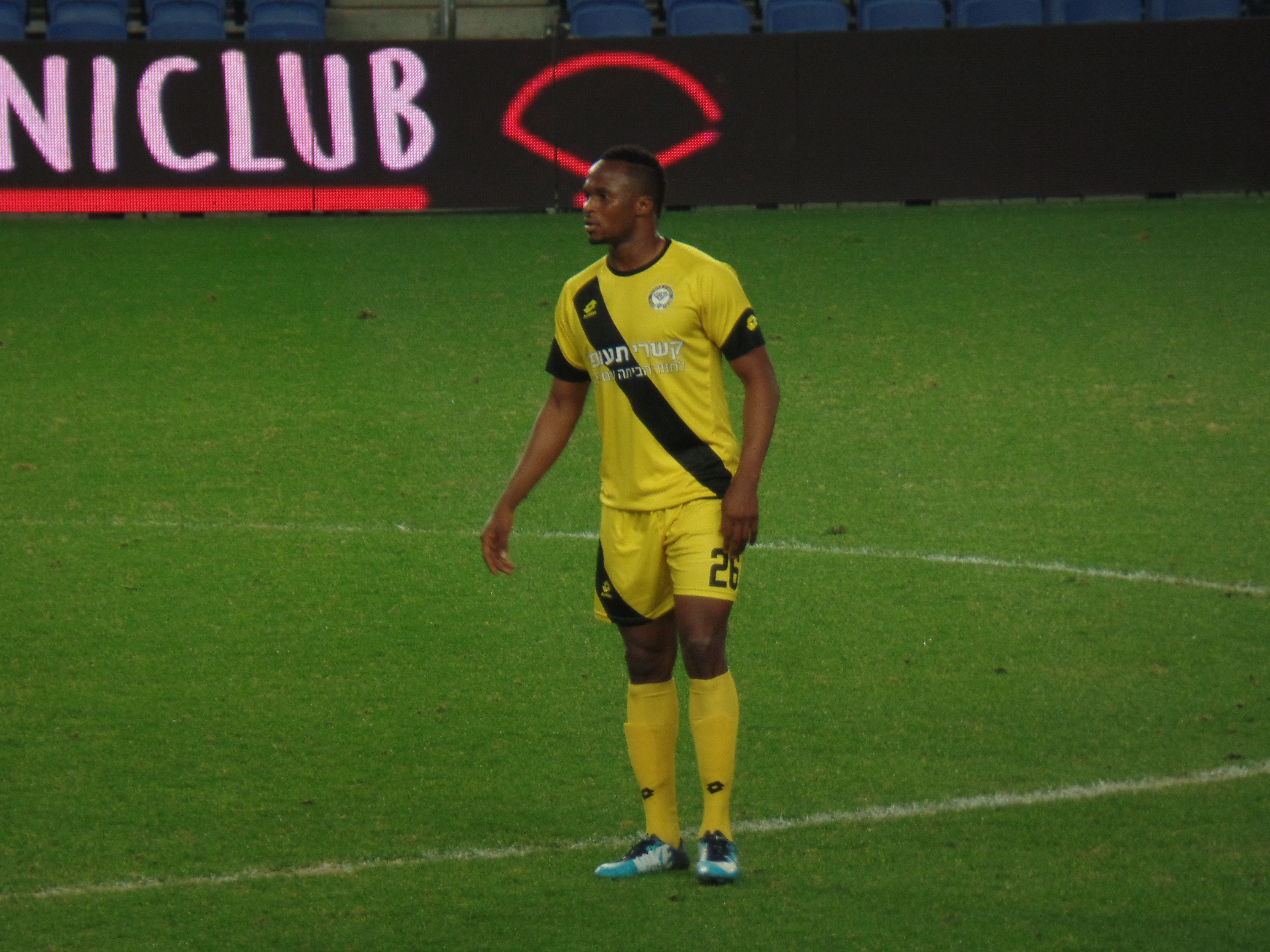 אלחסן קייטה במדי מכבי נתניה 2018